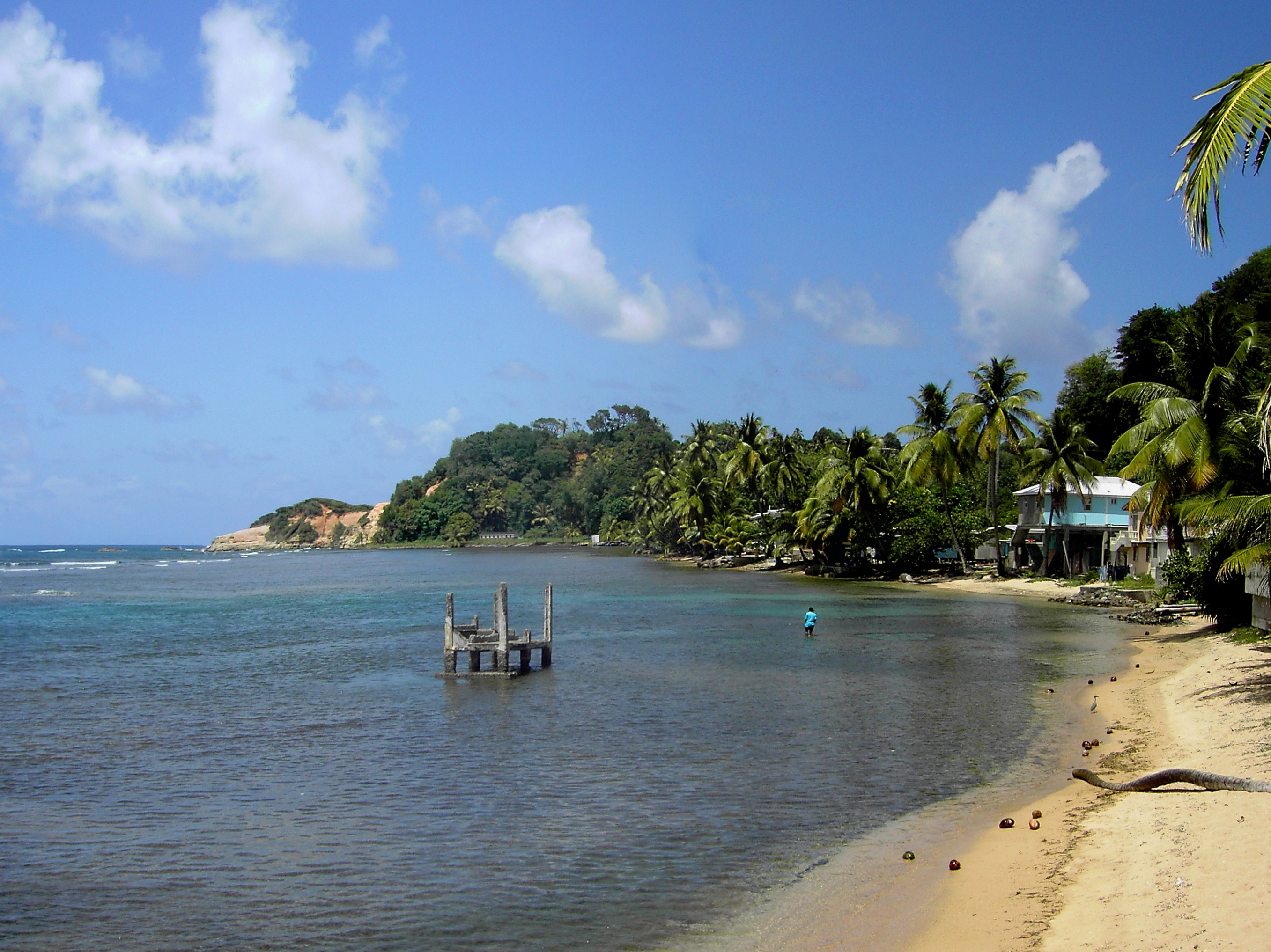 Calibishie, Dominica, W.I.